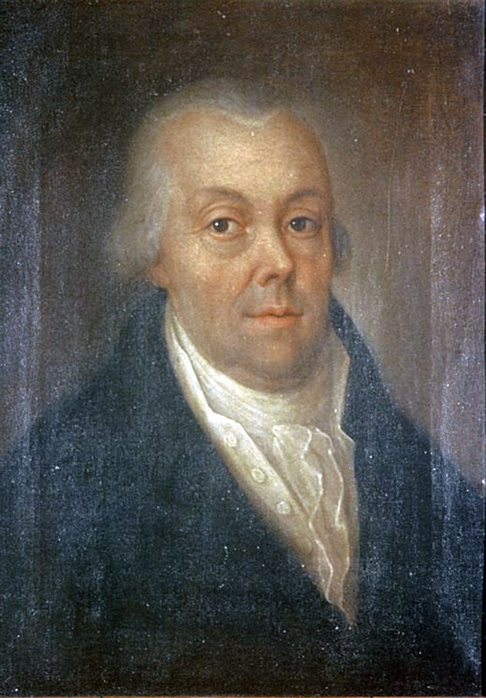 Porträt des Zois Ziga